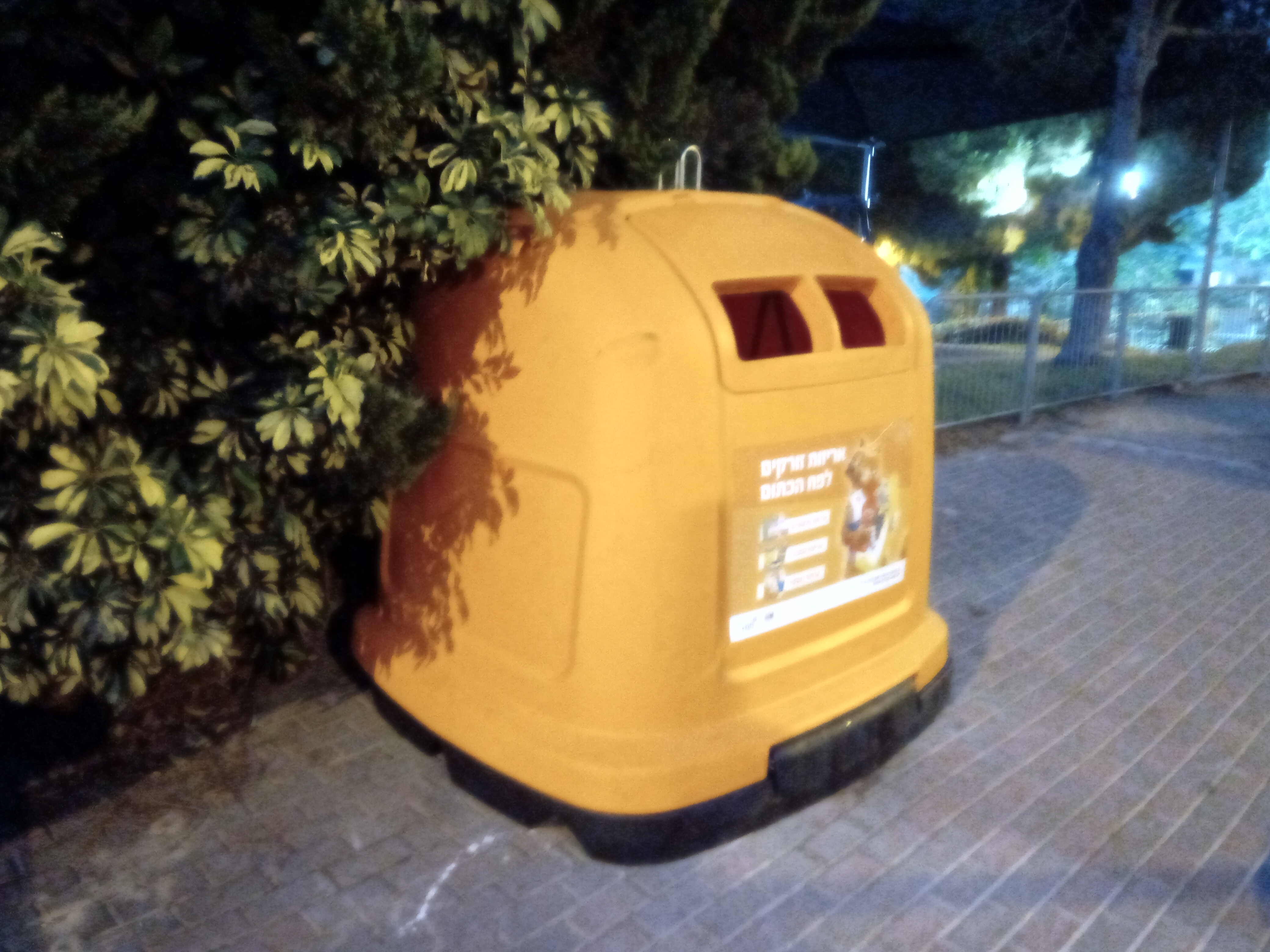 מתקן מיחזור ייחודי שהוצב בשכונת סביוני דניה ונועד למנוע הפיכת המתקן על ידי חזירי בר המחפשים אחר מזון